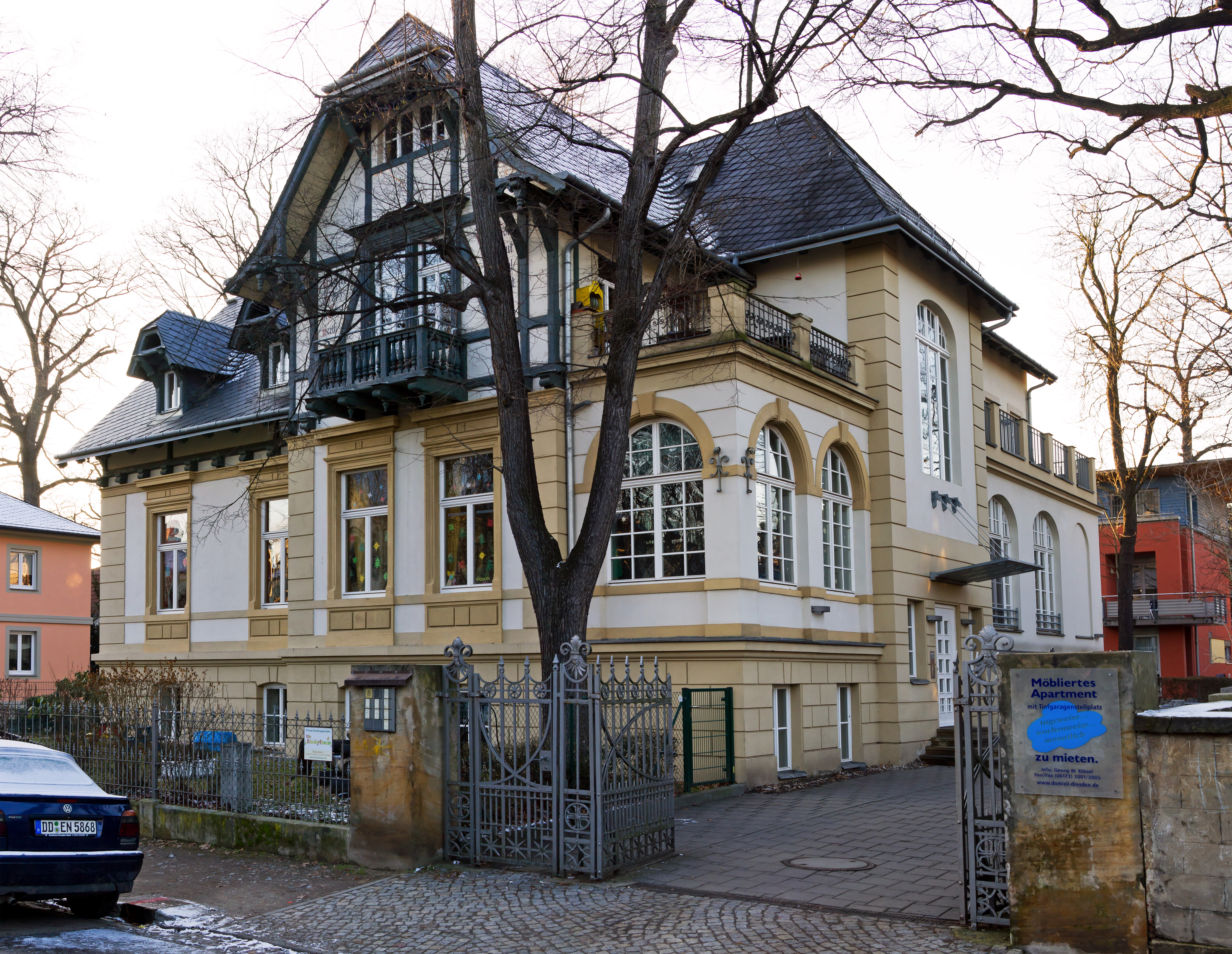 Glasewaldtstraße 8 in Dresden-Striesen. Heute ein Kindergarten, hinten dran Neubauten.